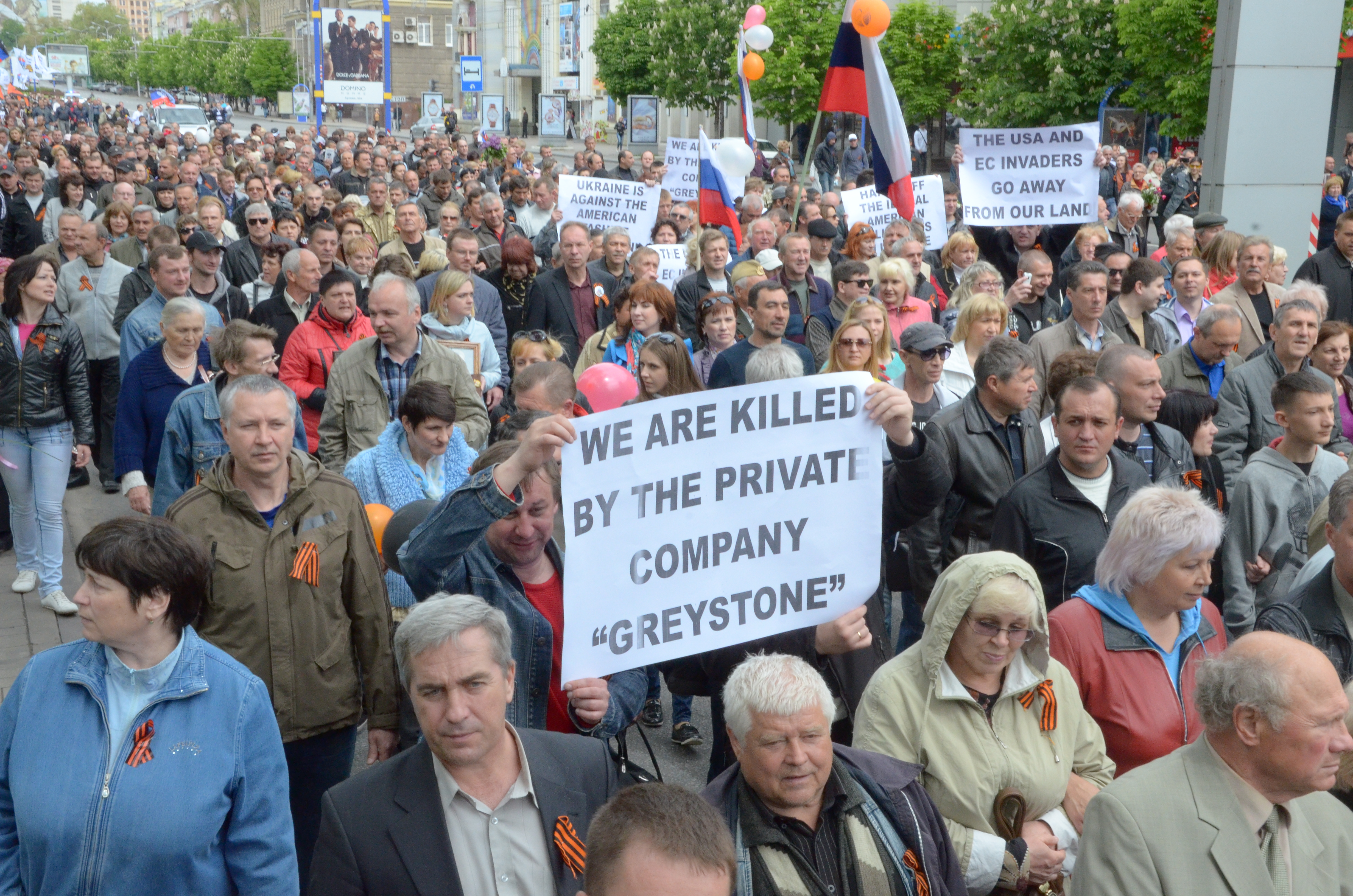 День Победы в Донецке